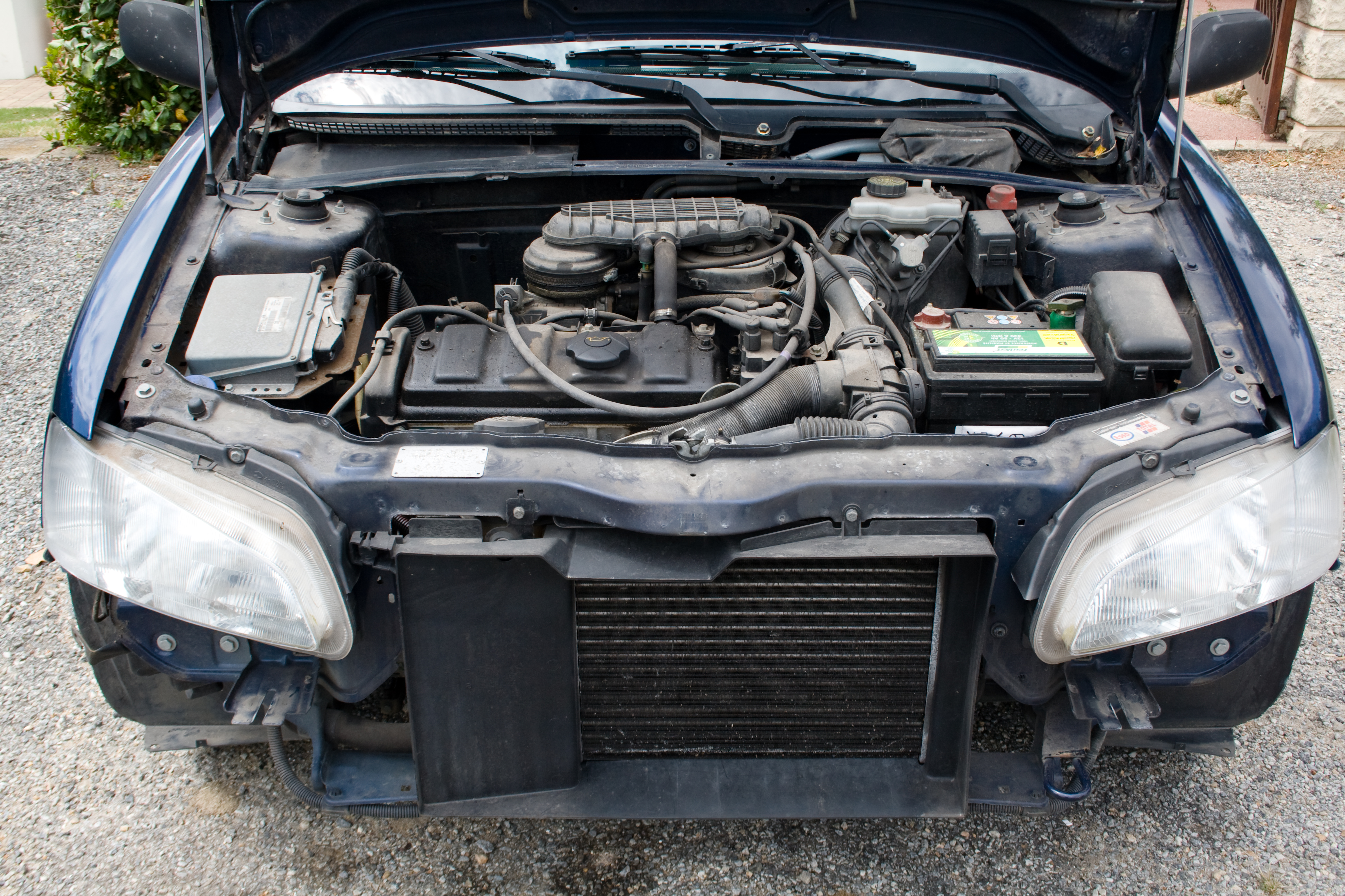 Radiateur de refroidissement moteur sur une voiture. Peugeot 106 essence.